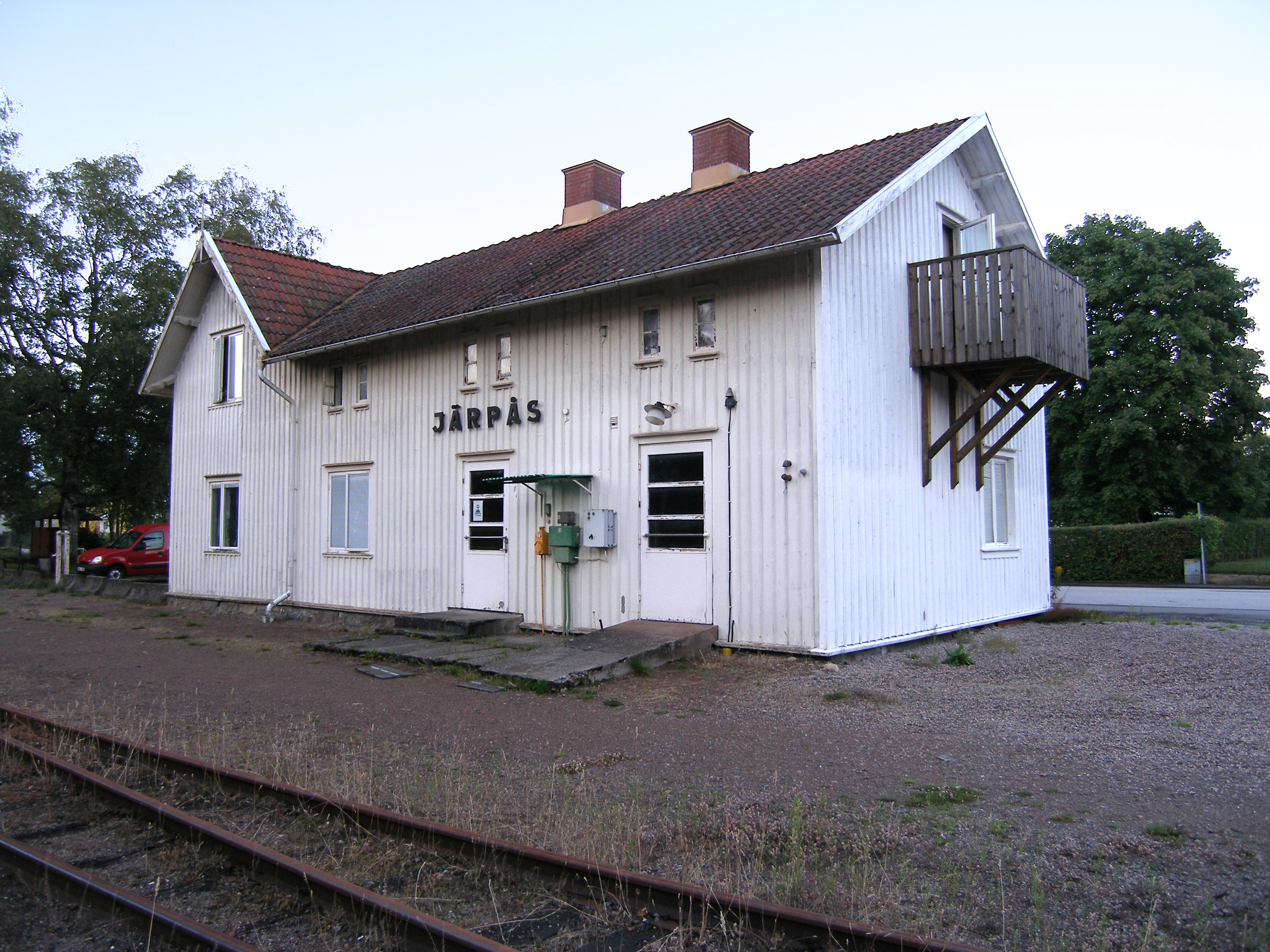 Järpås station. Anlagd vid Lidköping-Håkantorps Järnväg, numera en del av Kinnekullebanan.